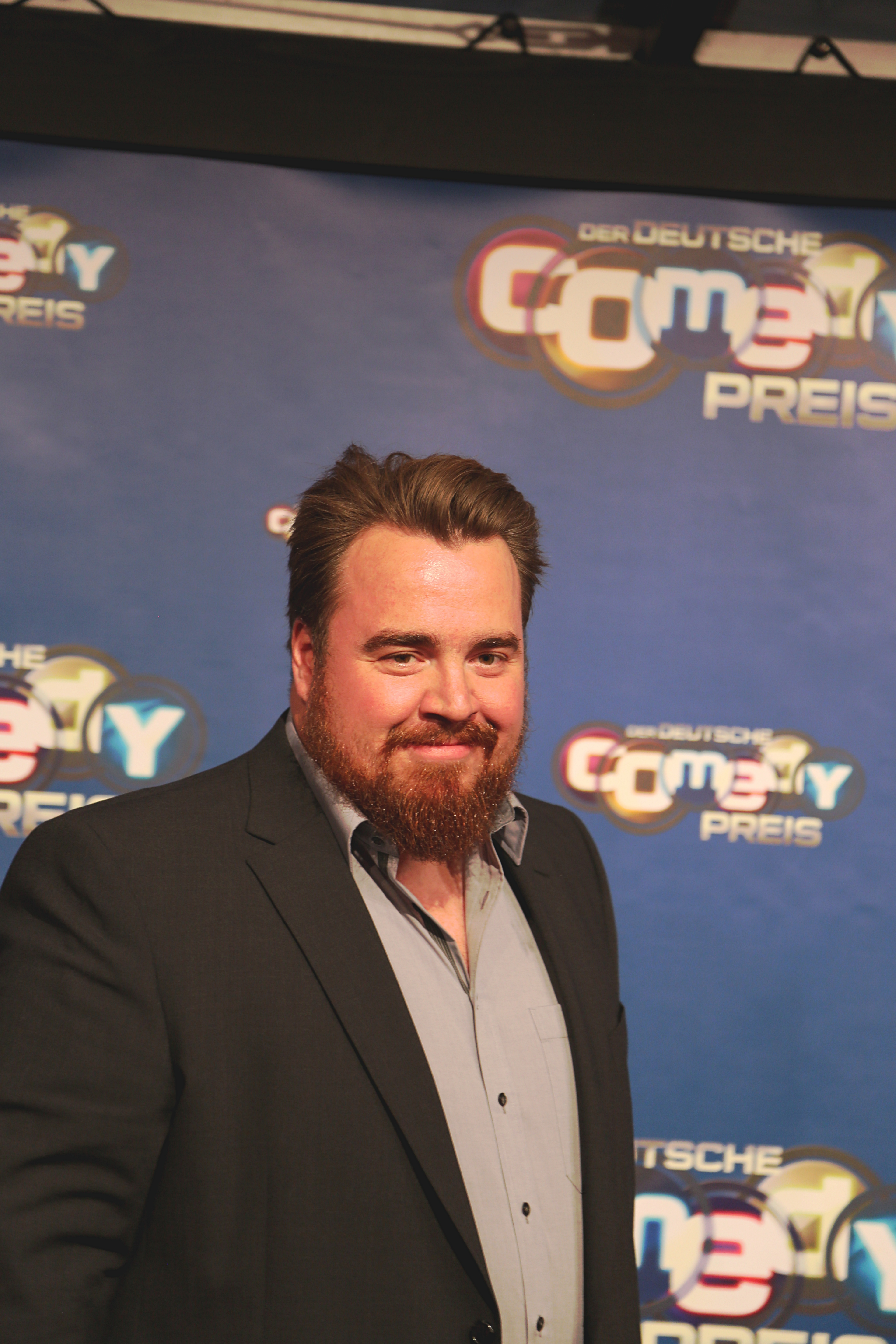 Tristan Seith beim Deutschen Comedypreis 2017.